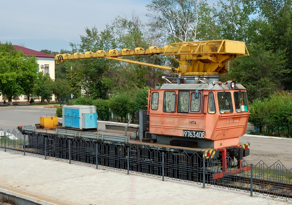 Мотовоз МПТ6-340, ст. Основа, г. Харьков